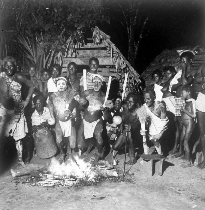 Repronegatief. Obiapre bij de Marrons. Dit wordt ook wel Wintidansi of wintipre in het surinaams genoemd. De dansers prepareren hun lichaam met kruiden en zijn daardoor in staat om door het vuur te dansen. Terwijl ze muziek maken (slaan op de dron, zingen en dansen) is het mogelijk dat de dansers in trance raken. Deze dans wordt alleen uitgevoerd bij speciale gelegenheden zoals verjaardagen. Of zou ook in het proces van een bepaalde sreka kunnen voorkomen.